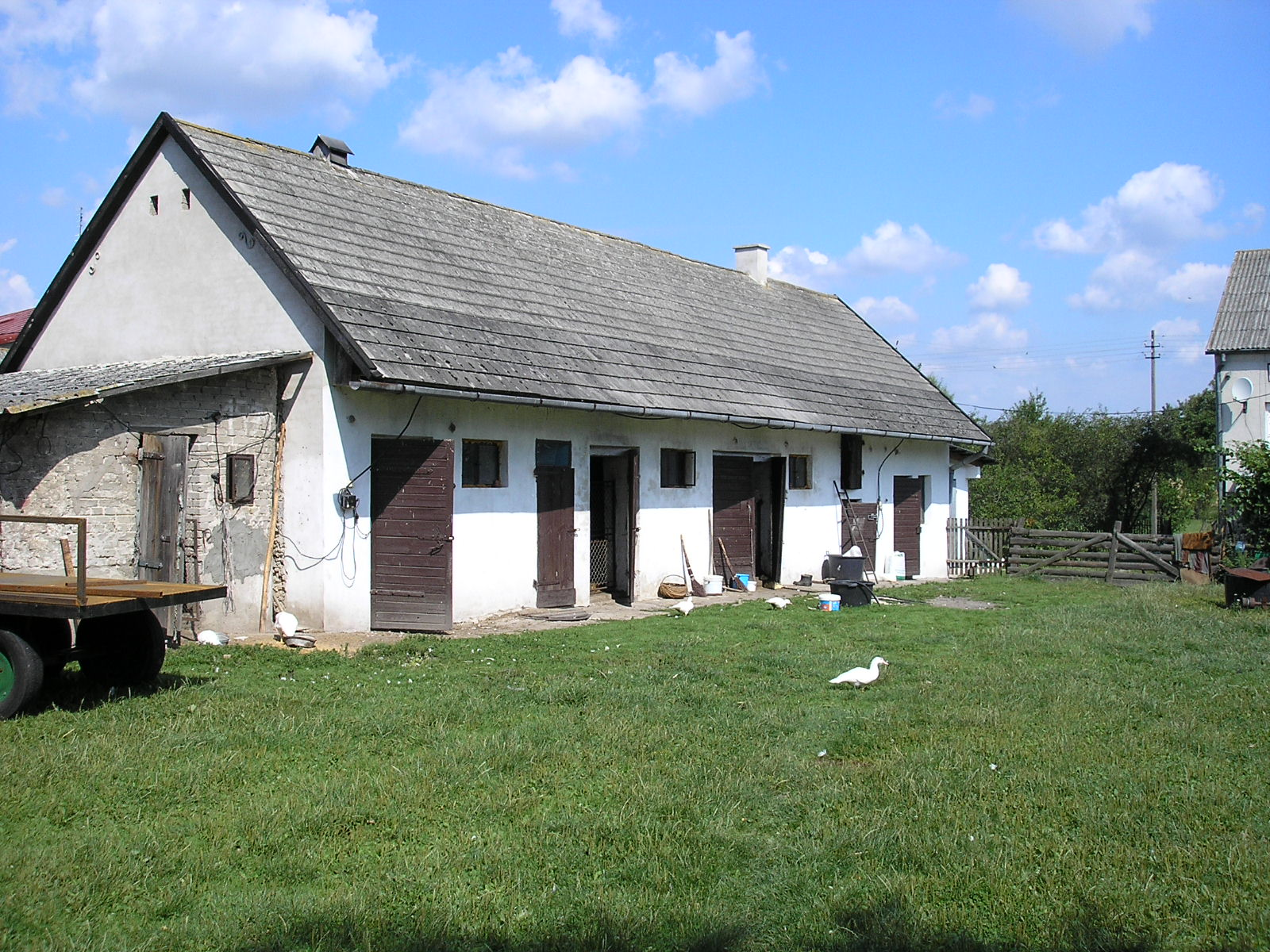 Jedna z wielu klasycznych obór wiejskich w Ręcznie.